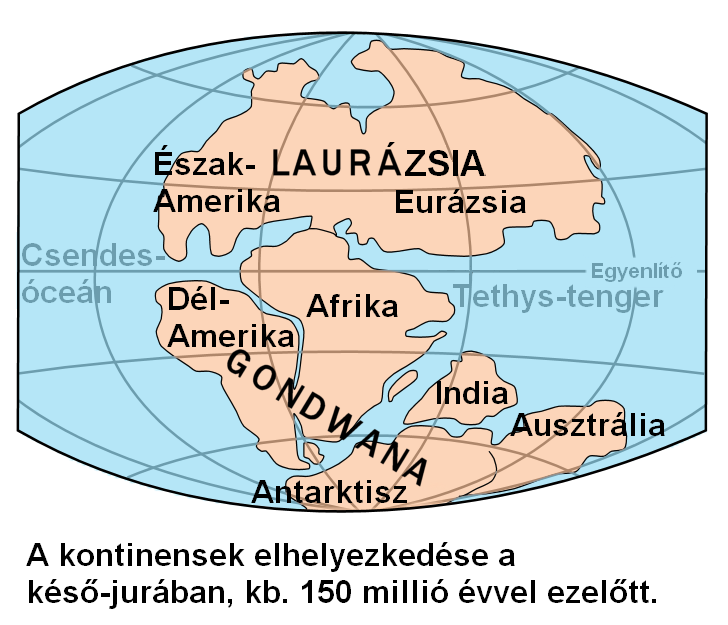 Laurázsia, Godwana